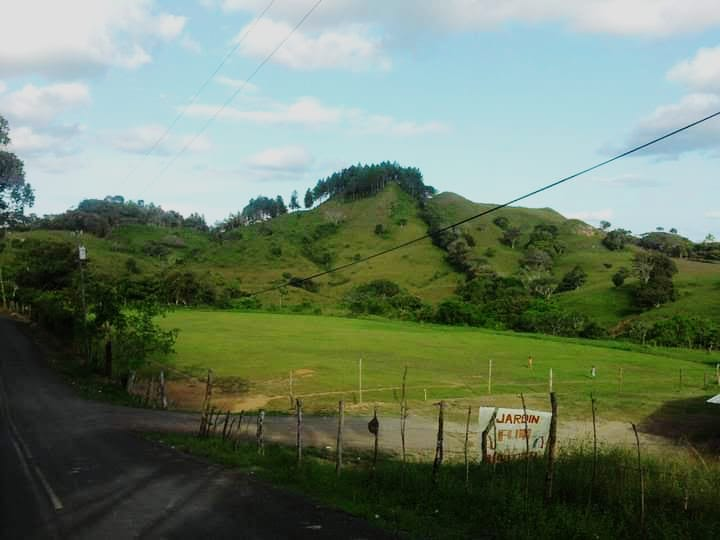 vista de algun cerro